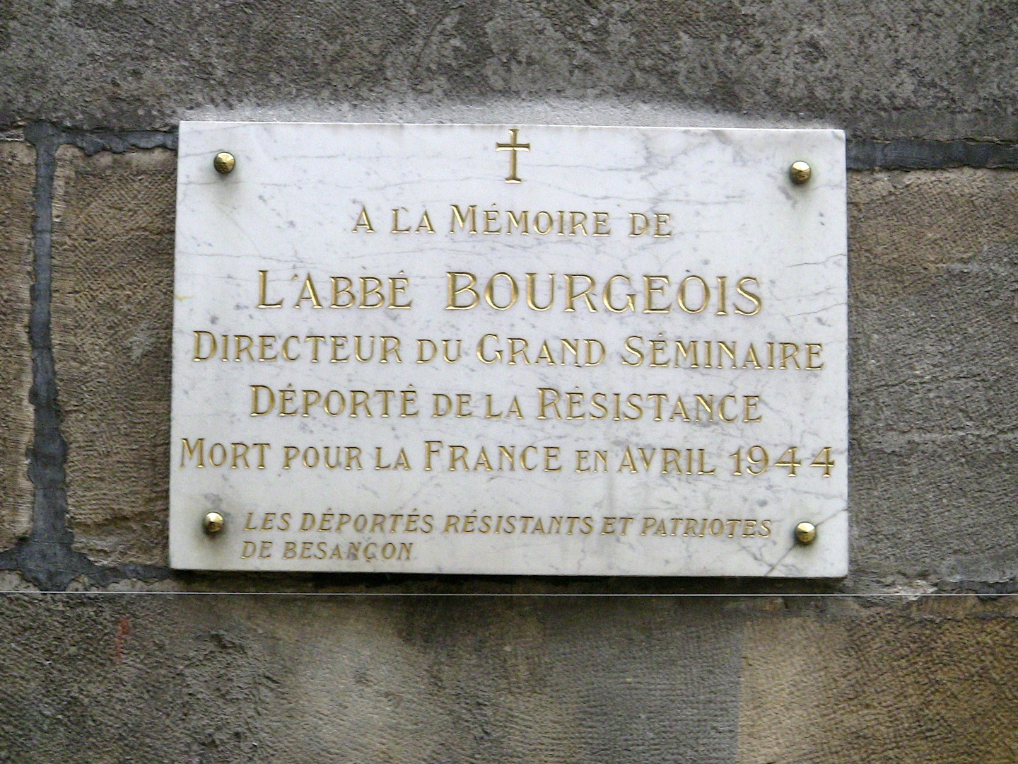 Plaque commémorative de l'abbé Bourgeois, située au Grand Séminaire de Besançon (Doubs, France).